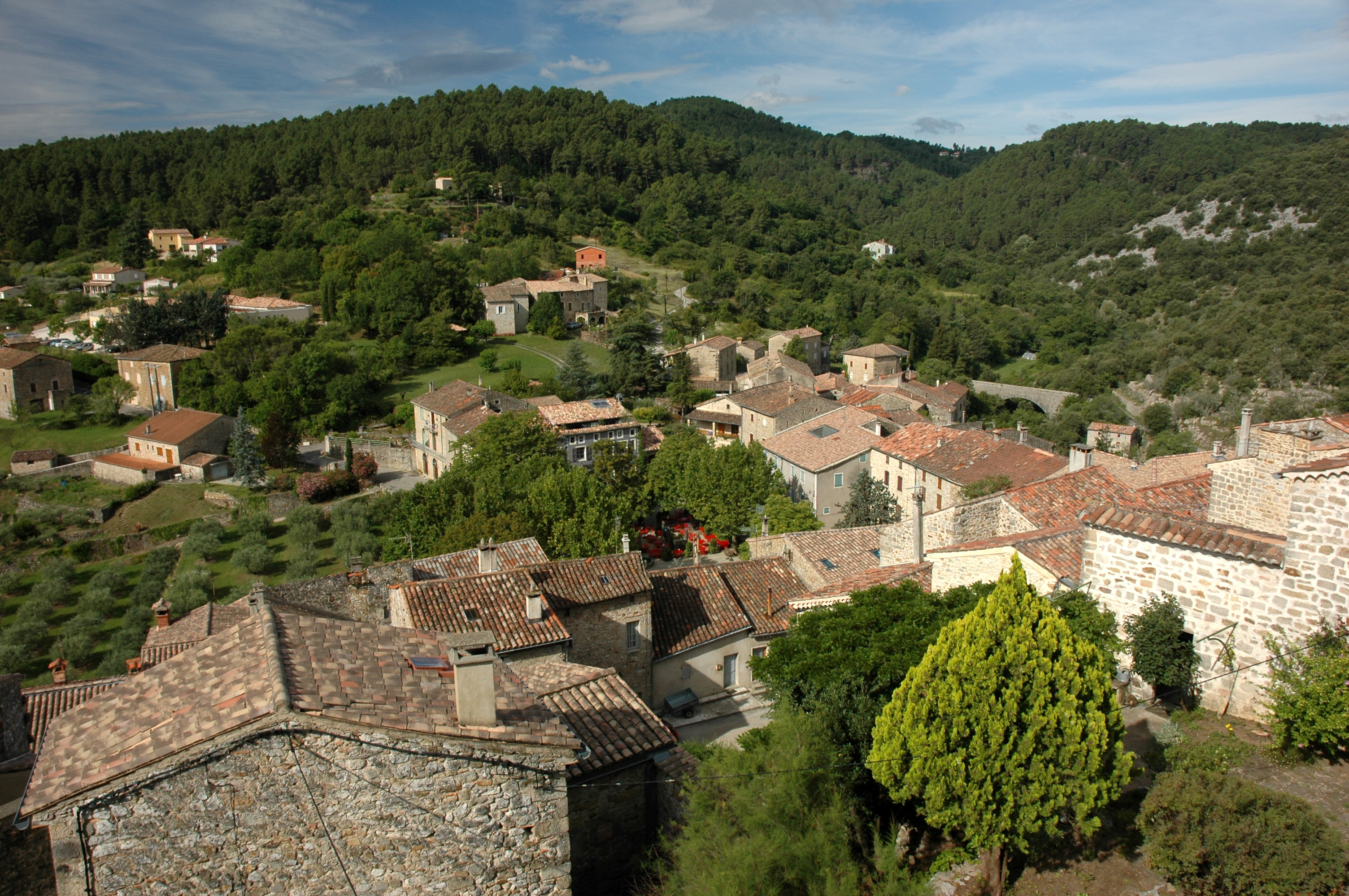 Banne